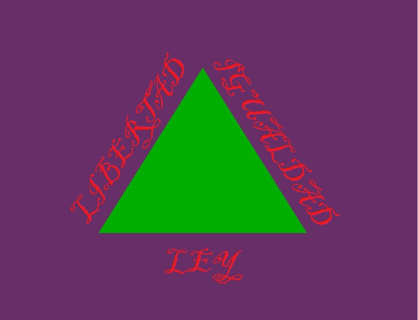 Reconstrucción de la bandera de Mariana Pineda, España hacia el año 1831.